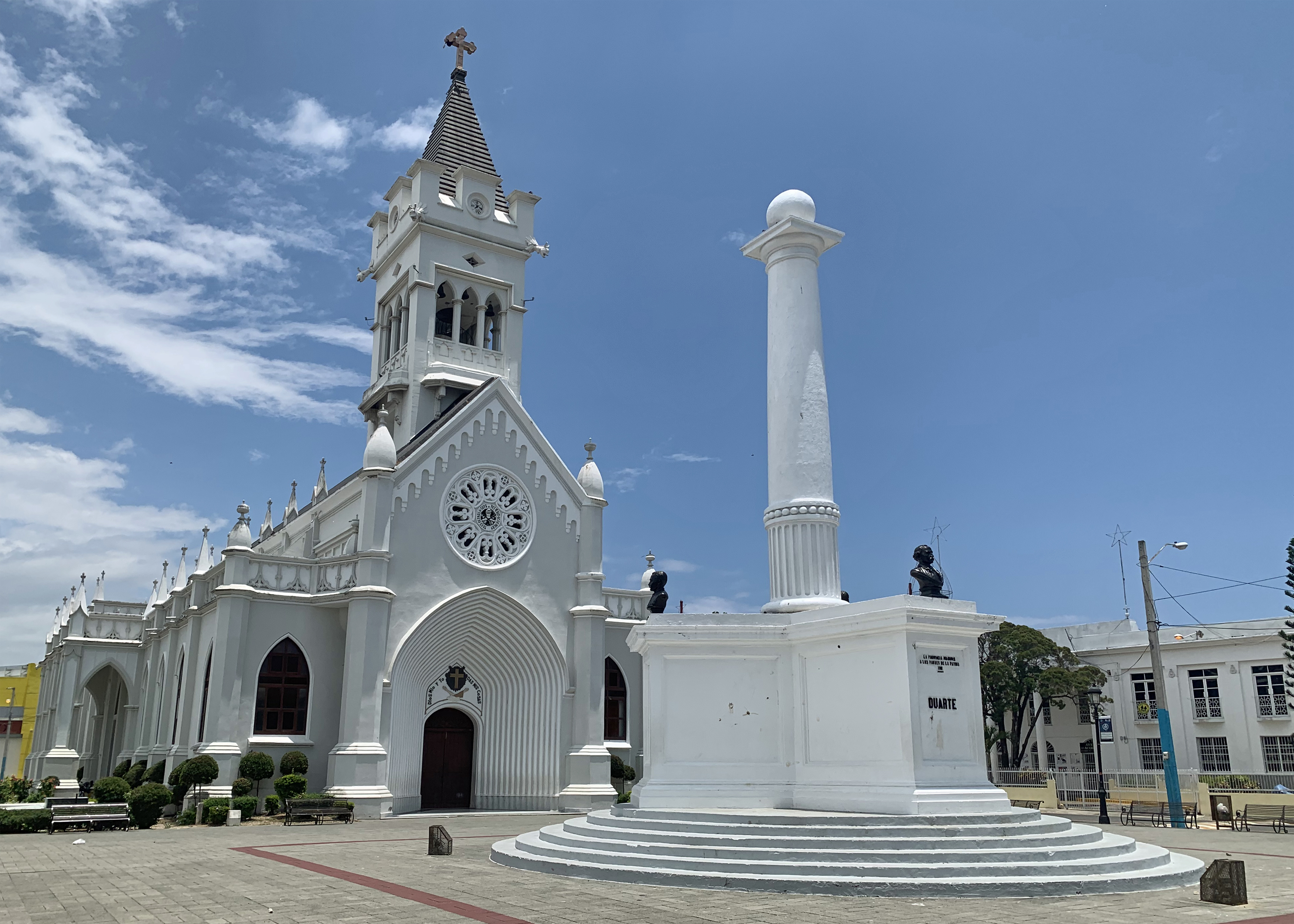 Catedral San Pedro Apóstol, San Pedro de Macoris